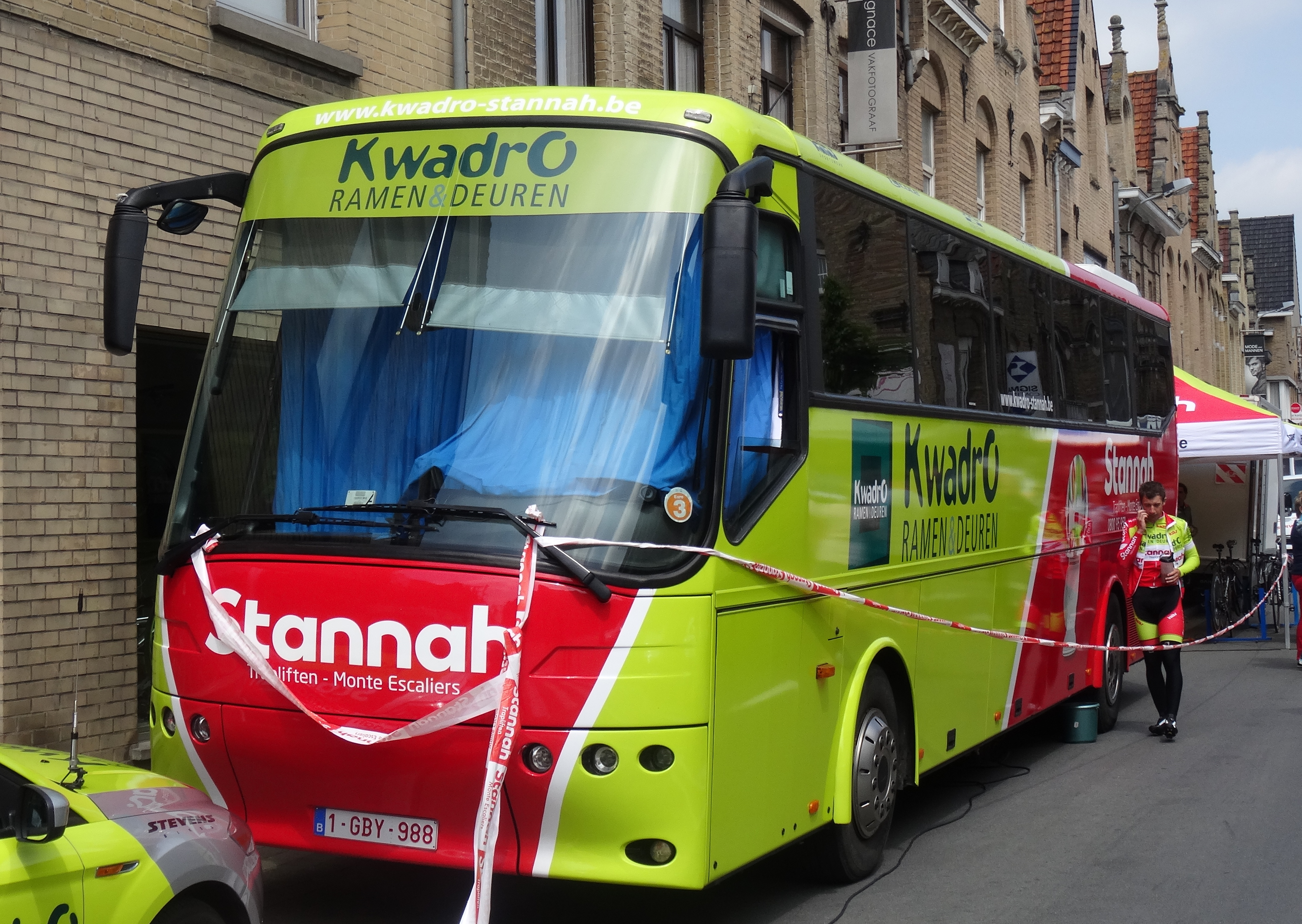 Reportage photographique réalisé le vendredi 30 mai à l'occasion du contre-la-montre individuel de la troisième étape du Tour de Belgique 2014 à Dixmude, Belgique.